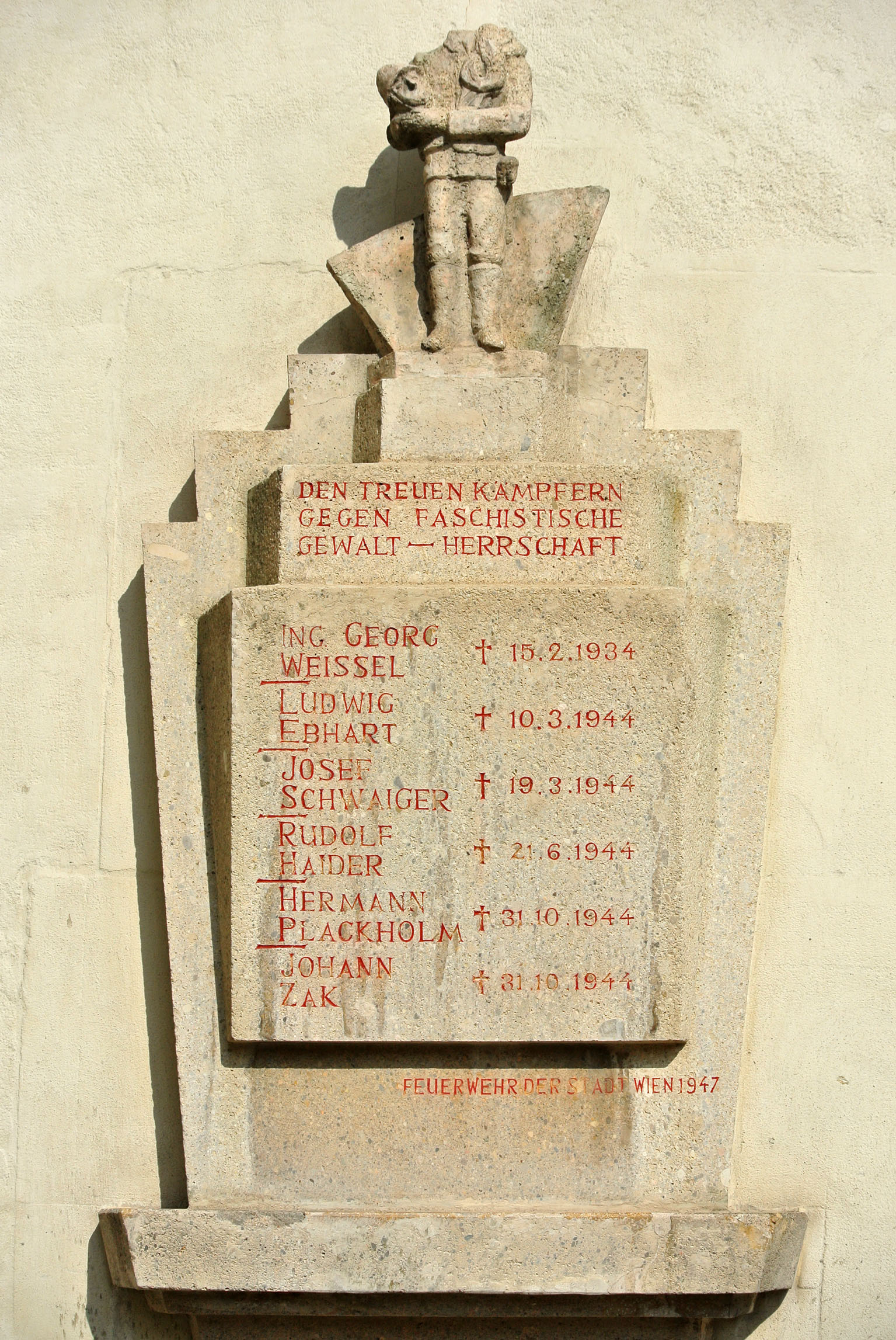 Gedenkstein an der Zentralfeuerwache Am Hof, Wien Innere Stadt Enthüllung des Gedenksteins am 27.Oktober 1947 durch Bürgermeister Theodor Körner. Der Gedenkstein wurde von Mario Petrucci gestaltet. DEN TREUEN KÄMPFERN GEGEN FASCHISTISCHE GEWALT - HERRSCHAFT ING. GEORG WEISSEL, Feuerwehroffizier,(* 28. März 1899 in Wien; † 15. Februar 1934).Zum Tode Verurteilt und hingerichtet. LUDWIG EBHART (* 3.11.1897; † 10.3.1944 starb nach Misshandlungen durch die Gestapo). JOSEF SCHWAIGER (* 13.8.1905; † 19.3.1944). In Erwartung der Todesstrafe, verübte er in der Untersuchungshaftanstalt Selbstmord durch Erhängen. RUDOLF HAIDER (*26.7.1896; † 21.6.1944) wurde im Landesgericht Wien enthauptet. HERMANN PLACKHOLM (*2.10.1904; † 31.10.1944), zum Tode verurteilt und erschossen. JOHANN ZAK (*20.6.1903; † 31.10.1944) zum Tode verurteilt und erschossen. FEUERWEHR DER STADT WIEN 1947